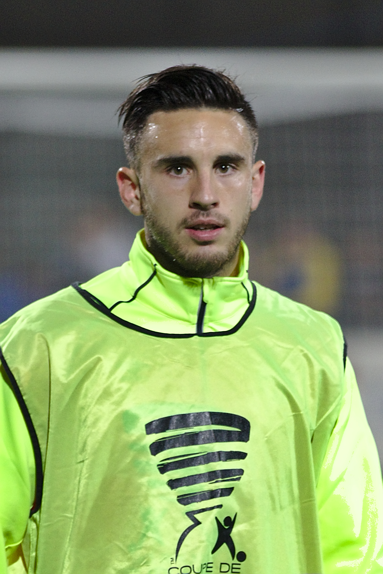 FBBP01 - FCN - 20151028 - Coupe de la Ligue - Adrien Thomasson